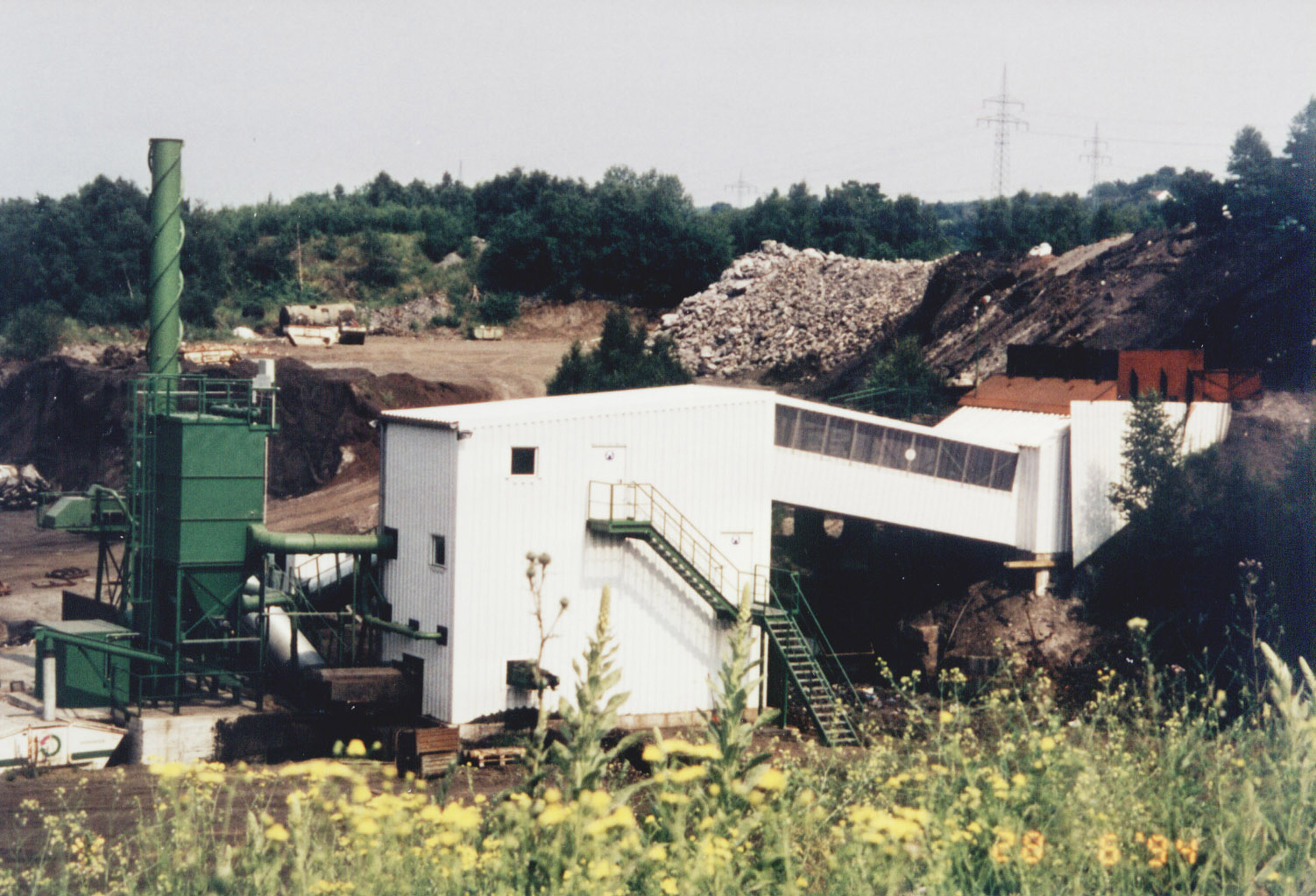 Aufbereitungsanlage